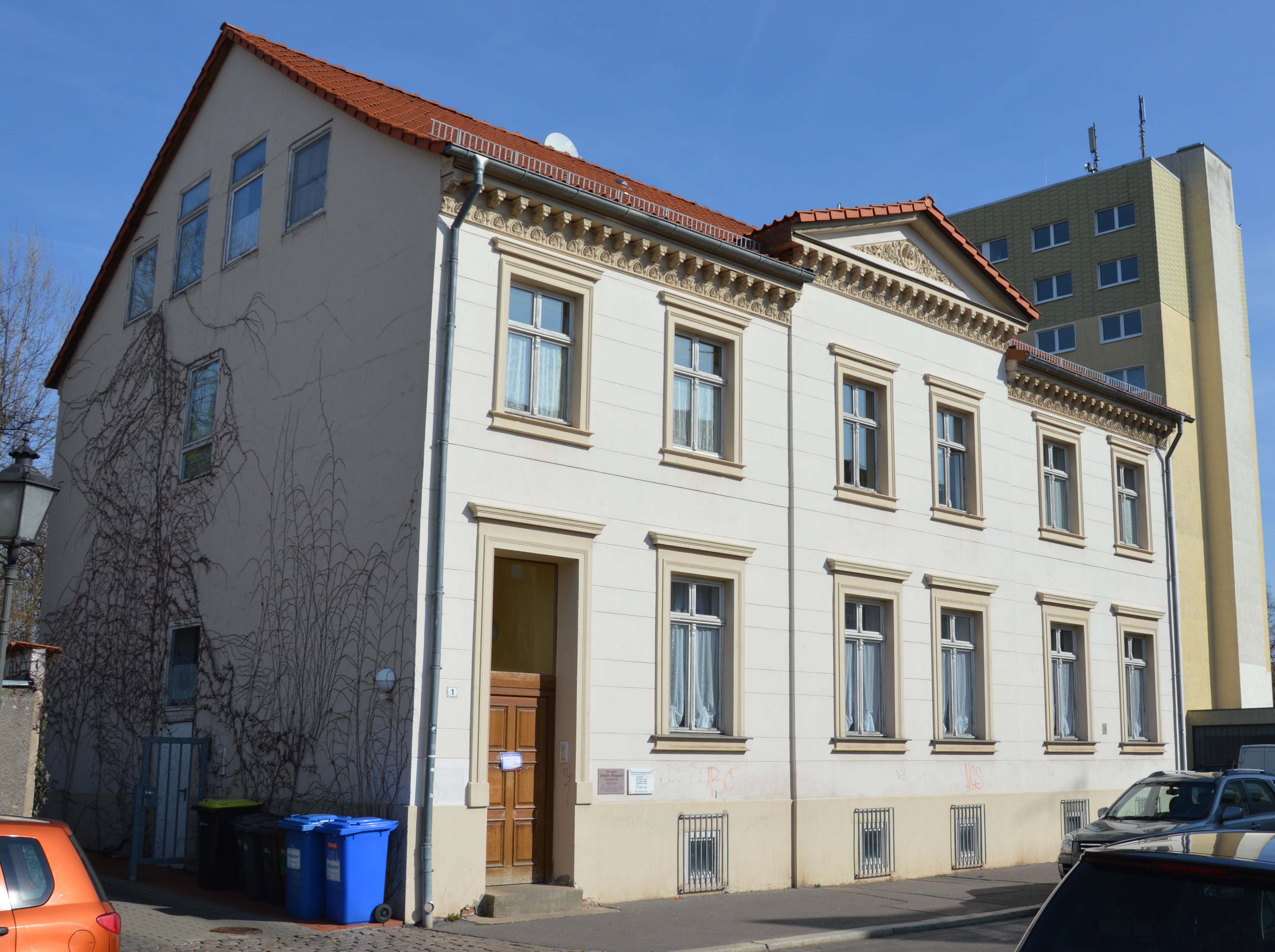 Haus Ritterstraße 1 in Magdeburg